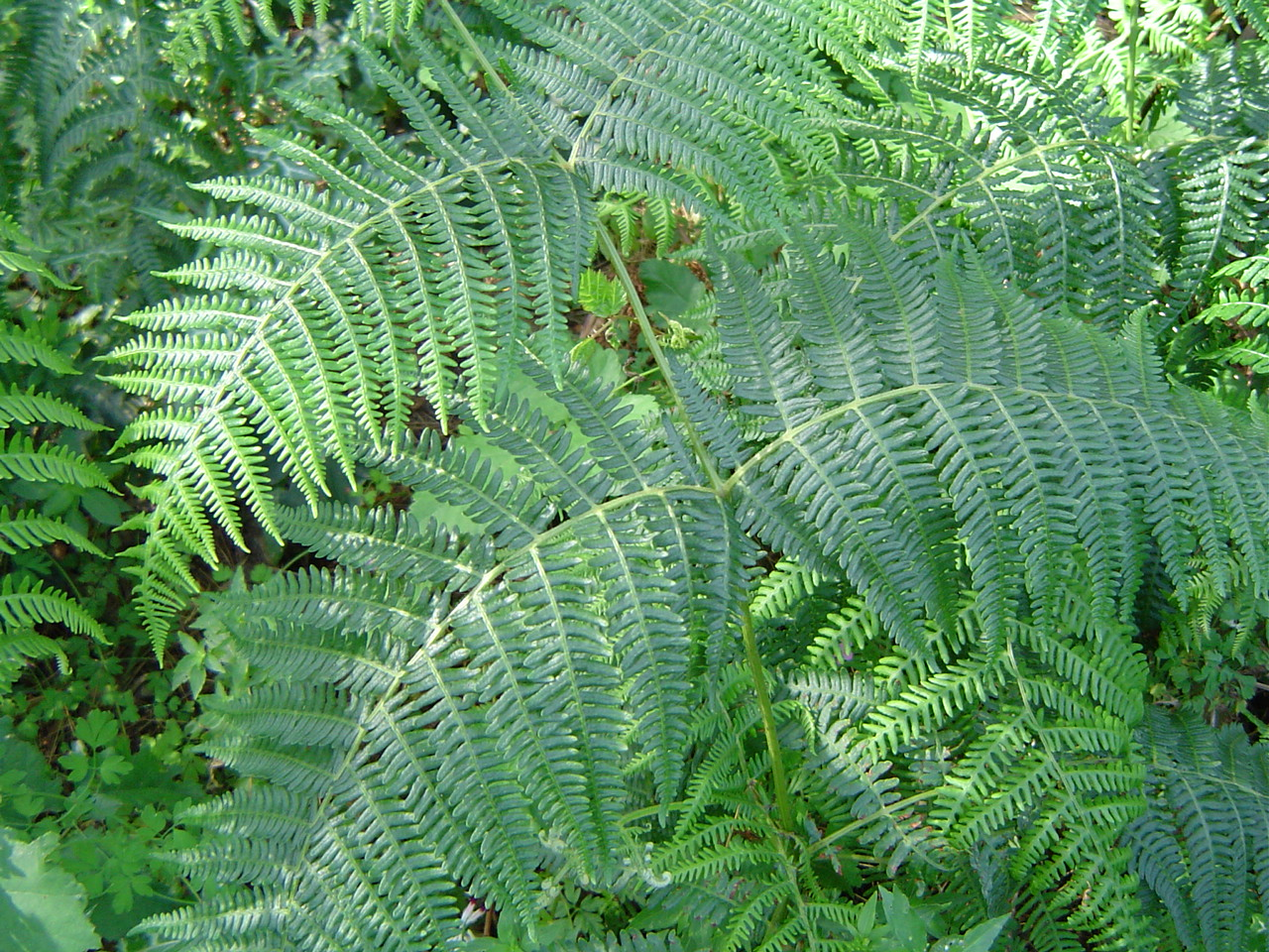 Pteridium aquilinum, Ceuta, NW de África, España